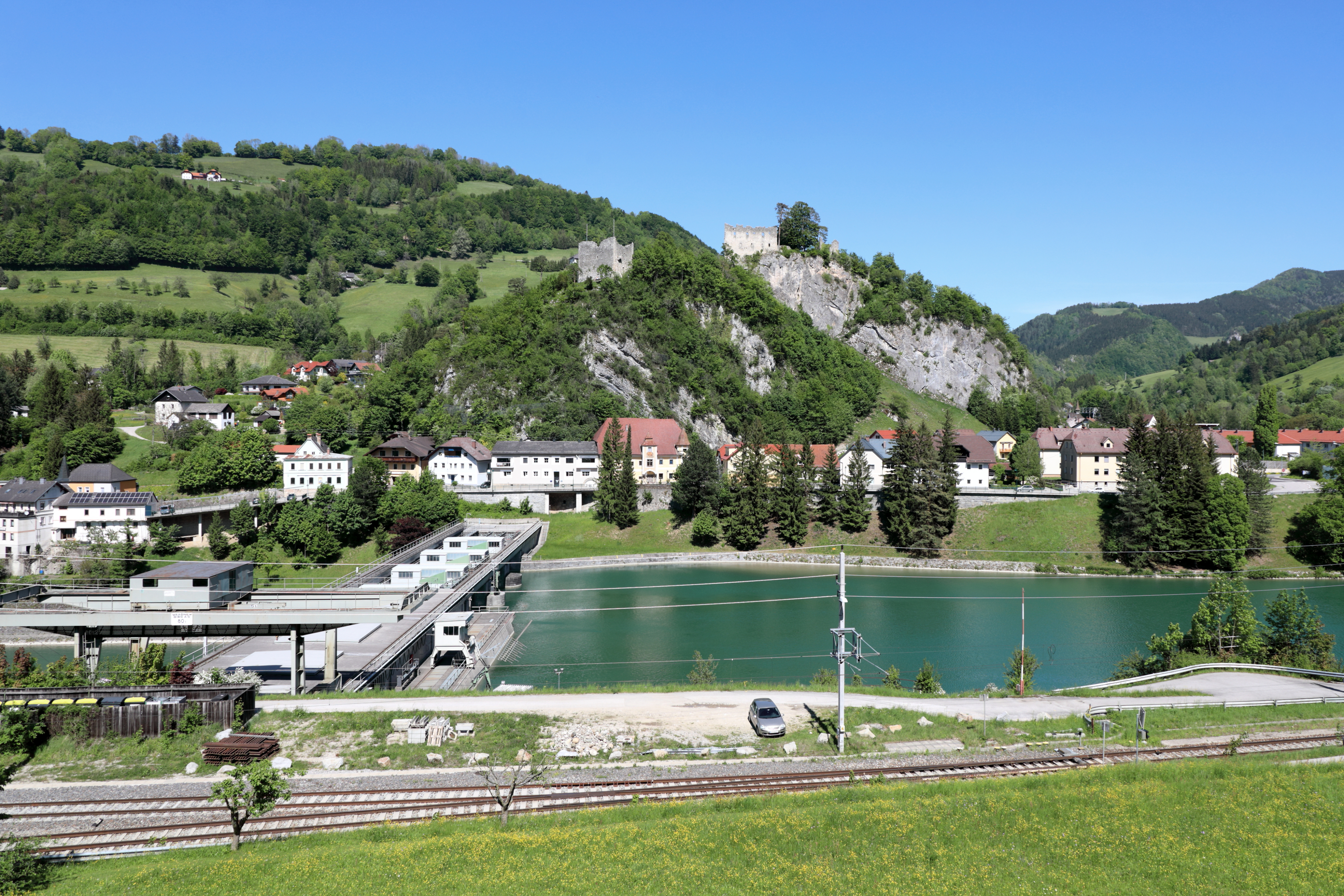 Blick von Südwesten auf das Ennskraftwerk (errichtet 1962) und die Burgruine in der oberösterreichischen Gemeinde Losenstein.